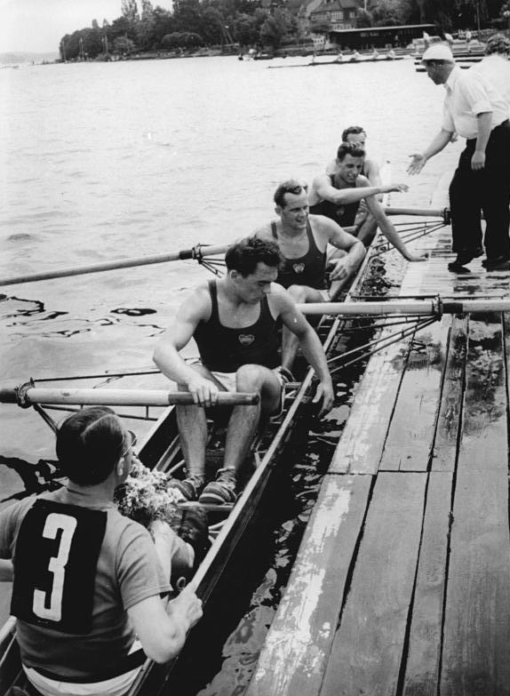 SC Motor Berlin, Vierer Zentralbild Funck- 17.7.1955 DDR-Meisterschaften der Ruderer in Grünau Am Sonntag, dem 17.7.1955, fand auf dem Olympiakurs in Grünau die DDR-Rudermeisterschaft 1955 statt. In allen Wettbewerben gab es packende Kämpfe, die eindeutig den Leistungsanstieg unserer Ruderer unter Beweis stellten. UBz: DDR-Meister 1955 im Vierer m. Stm. wurde der SC Motor Berlin. Die Motormannschaft am Landungssteg.